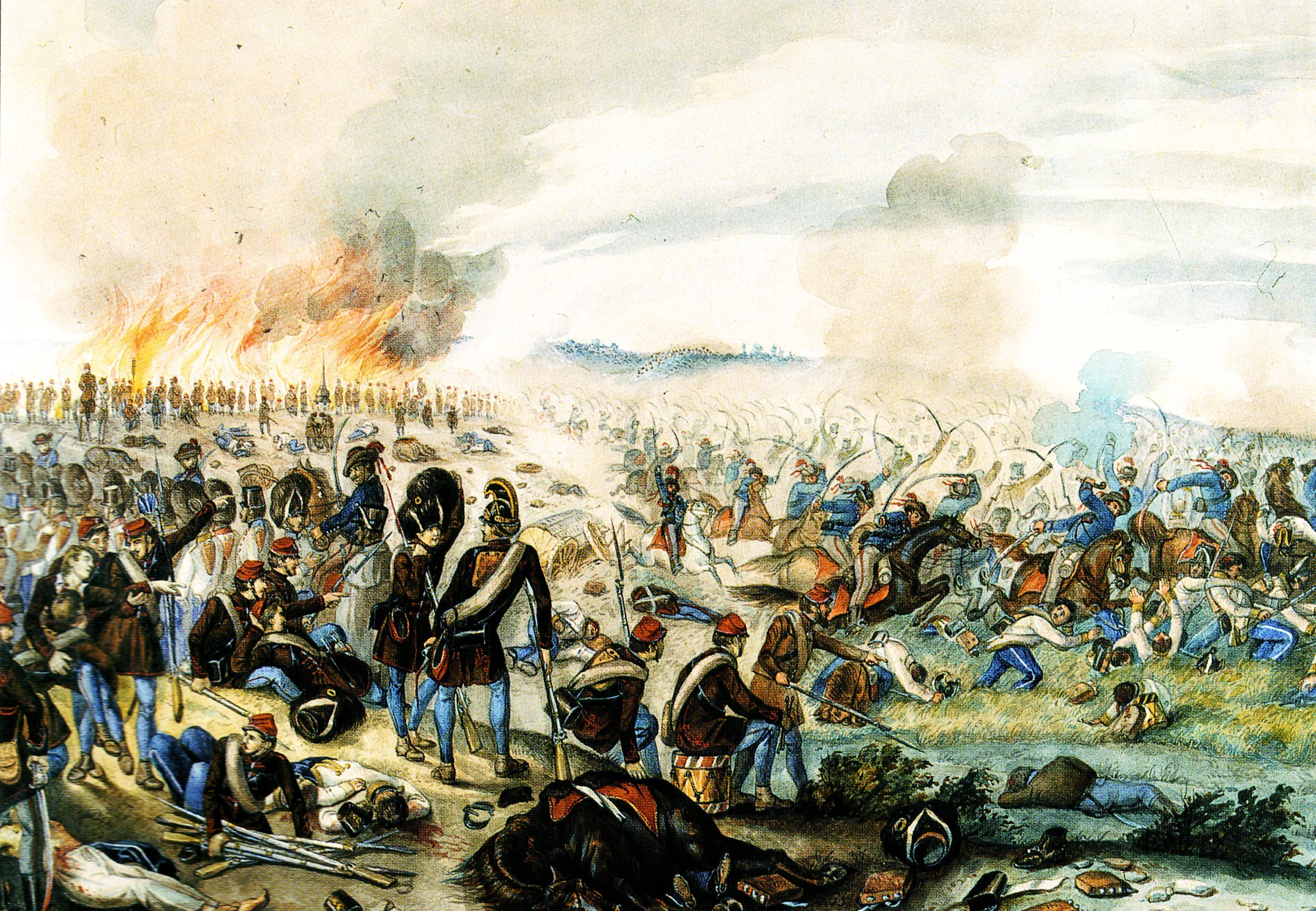 A magyar lovasság üldözi a menekülő császáriakat a nagysallói ütközetben, 1849. április 19-én. Than Mór festménye